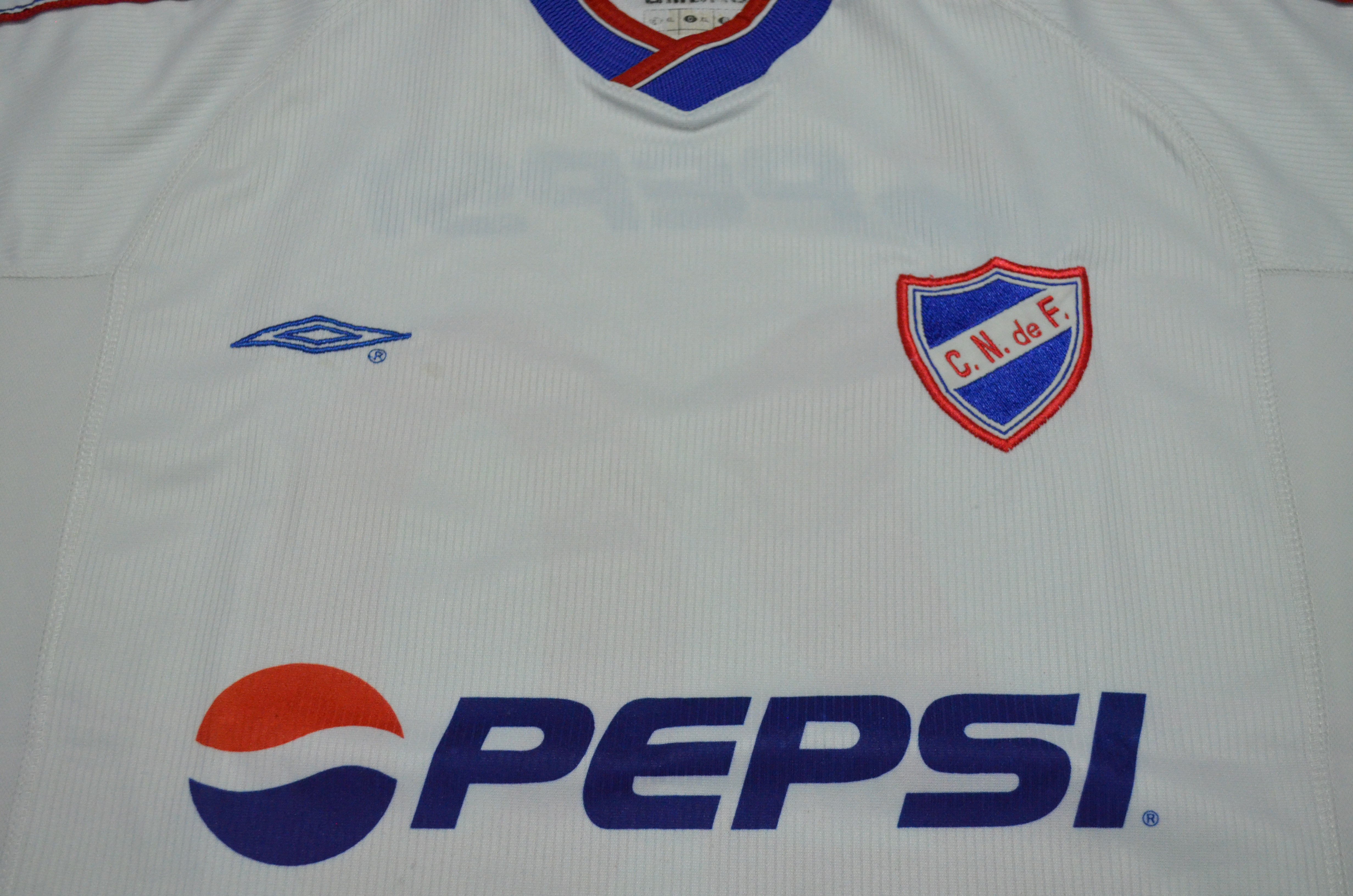 Uniforme de Nacional, patrocinado por Pepsi